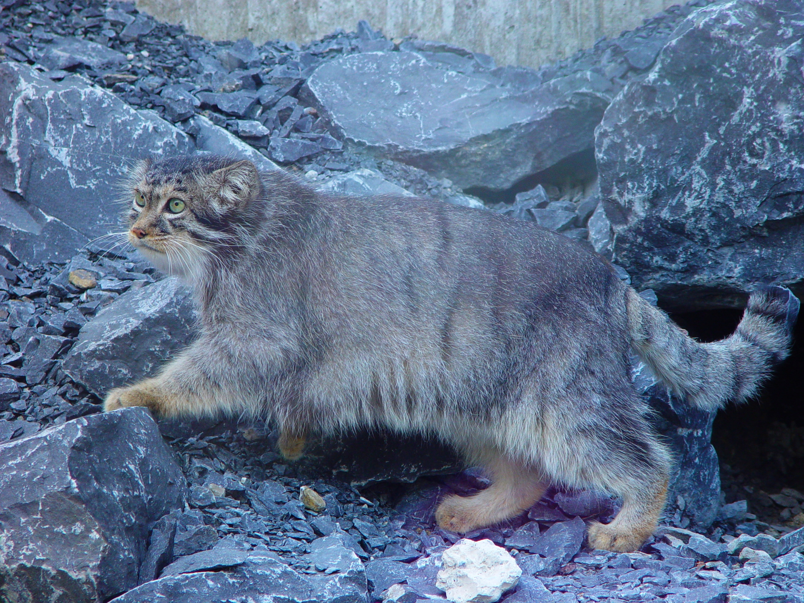 Manul (Otocolobus manul) in Zoo Zürich